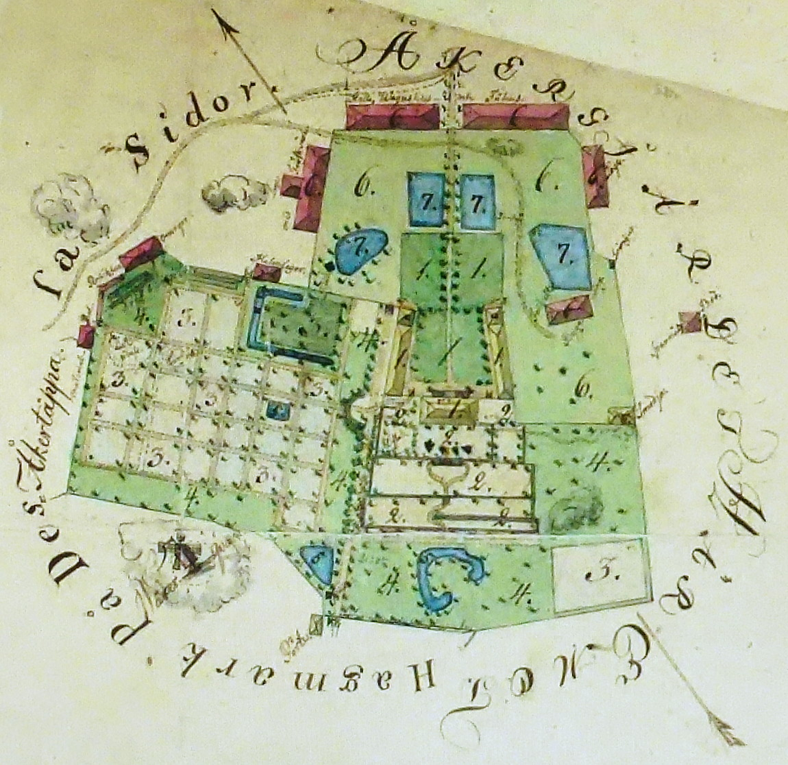 Säteriet Hässelby, Spånga socken , avmätning 1810, karta 1812